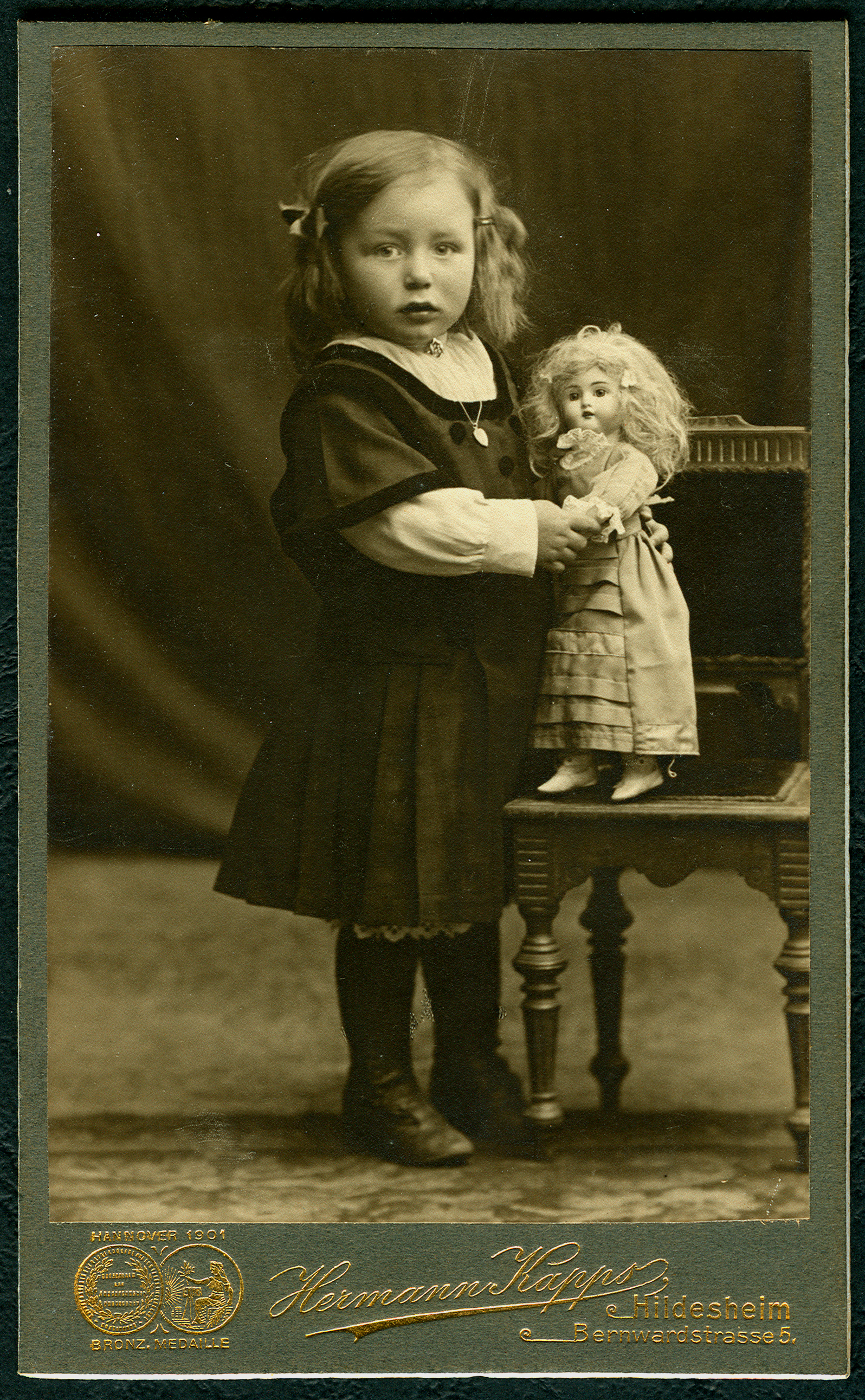 Atelierfotografie im Format einer Carte de Visite eines jungen Mädchens, die neben einem Kinderstuhl steht und eine Porzellankopfpuppe festhält. Im Kartonträger ist mit goldener Farbe mit Vor-und Rückseite eine "BRONZ. MEDAILLE" von einer Ausstellung in Hannover von 1901 eingeprägt, rechts daneben der Schriftzug "Hermann Kapps, Hildesheim, Bernwardstrasse 5" ...